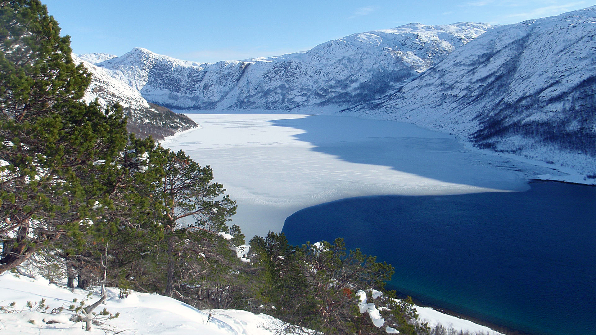 Vinter i Kjerfjorden